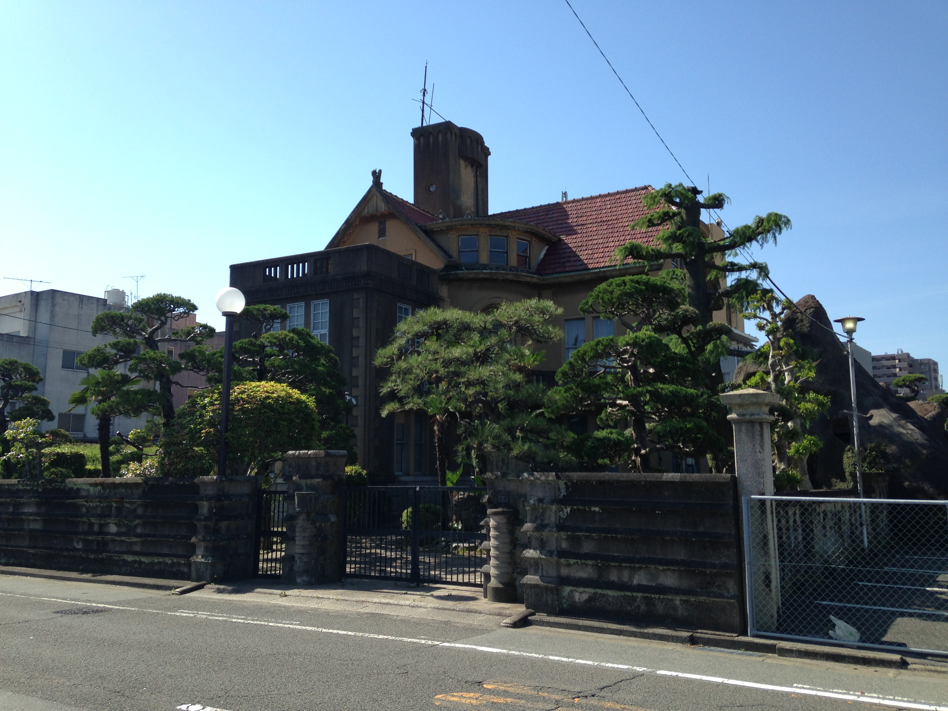 三河家住宅